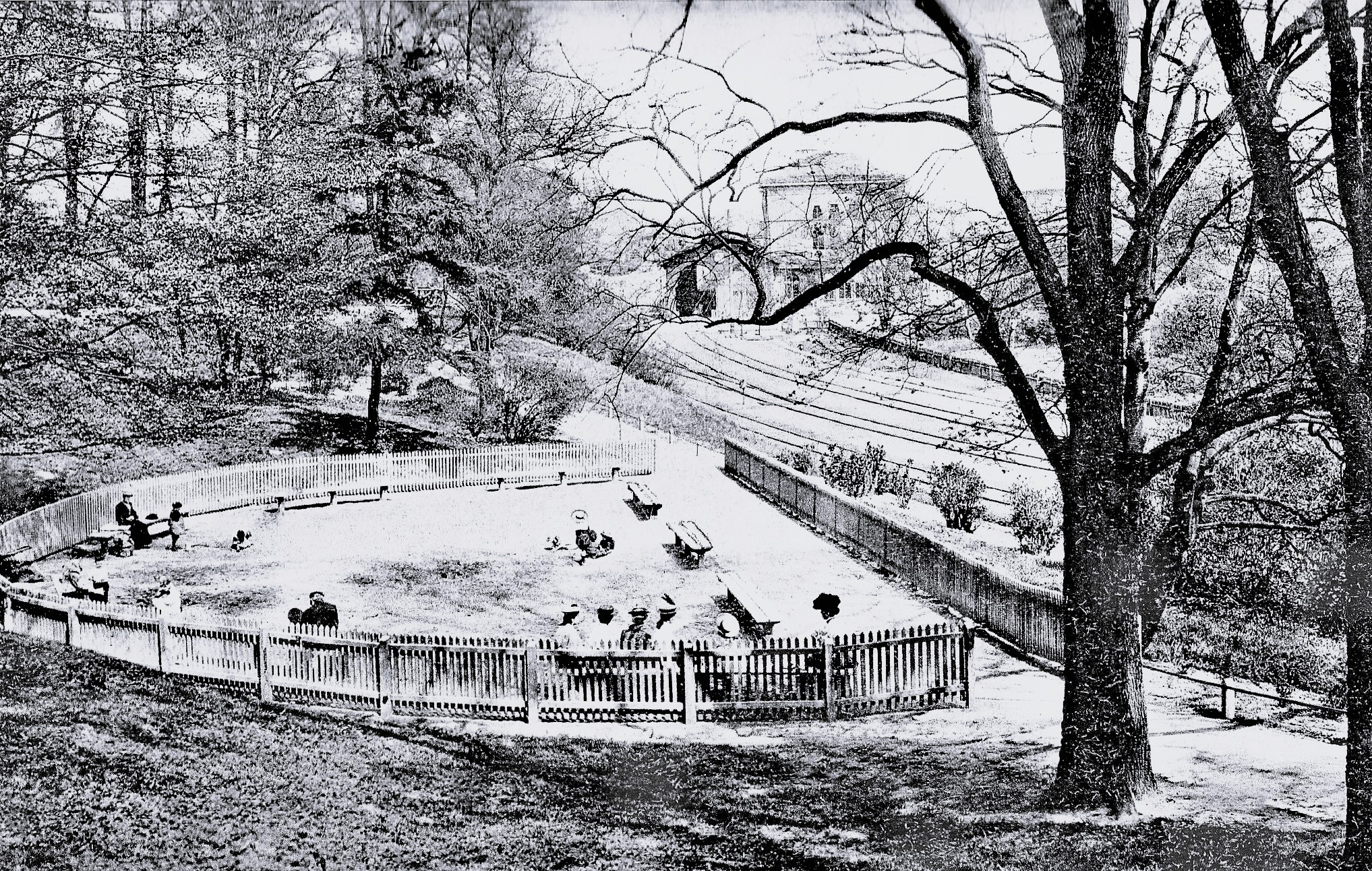 Spielplatz an der Bastion Holstentor, 1906.